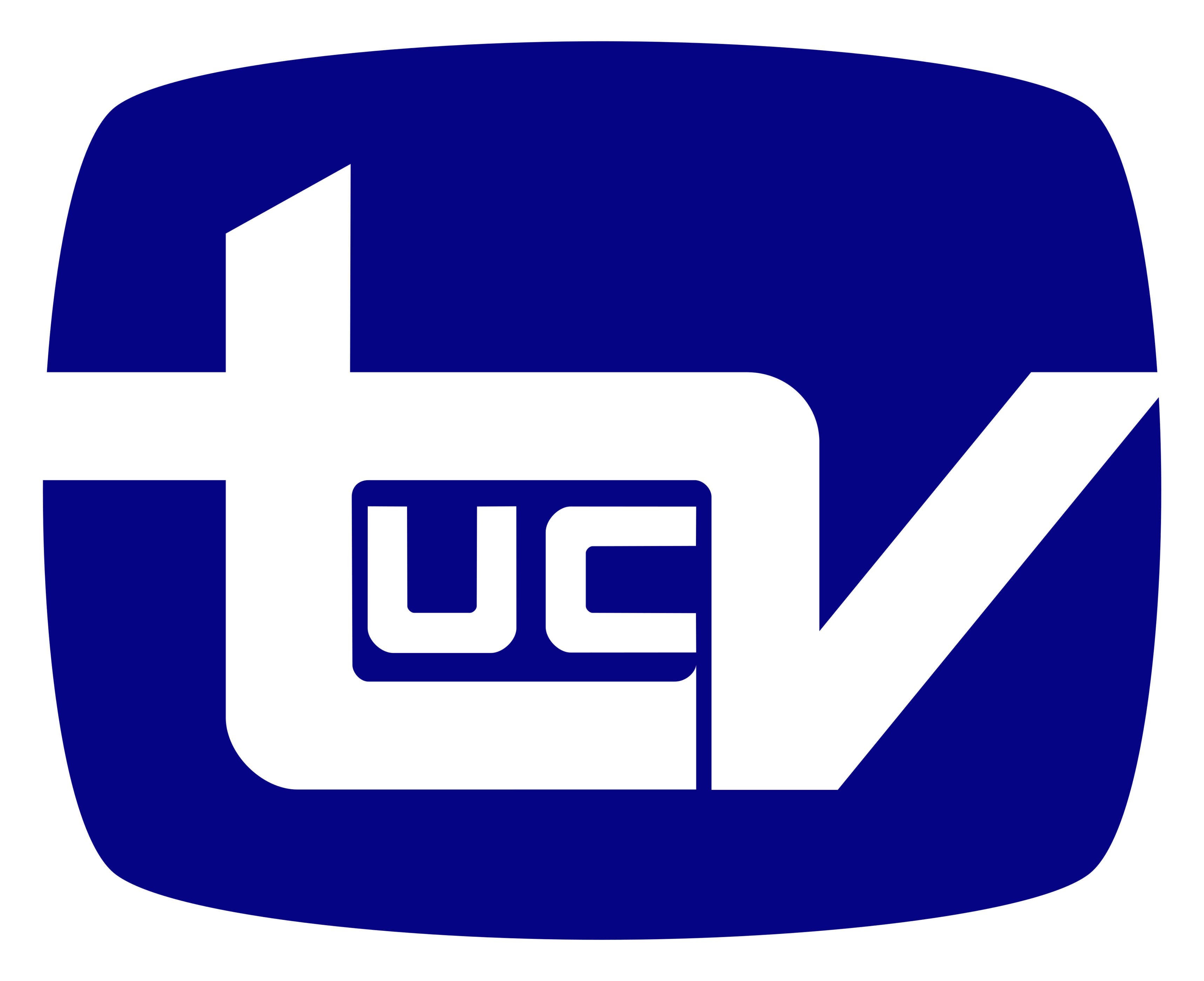 Emblema de Canal 13 usado entre 1979 y 1999